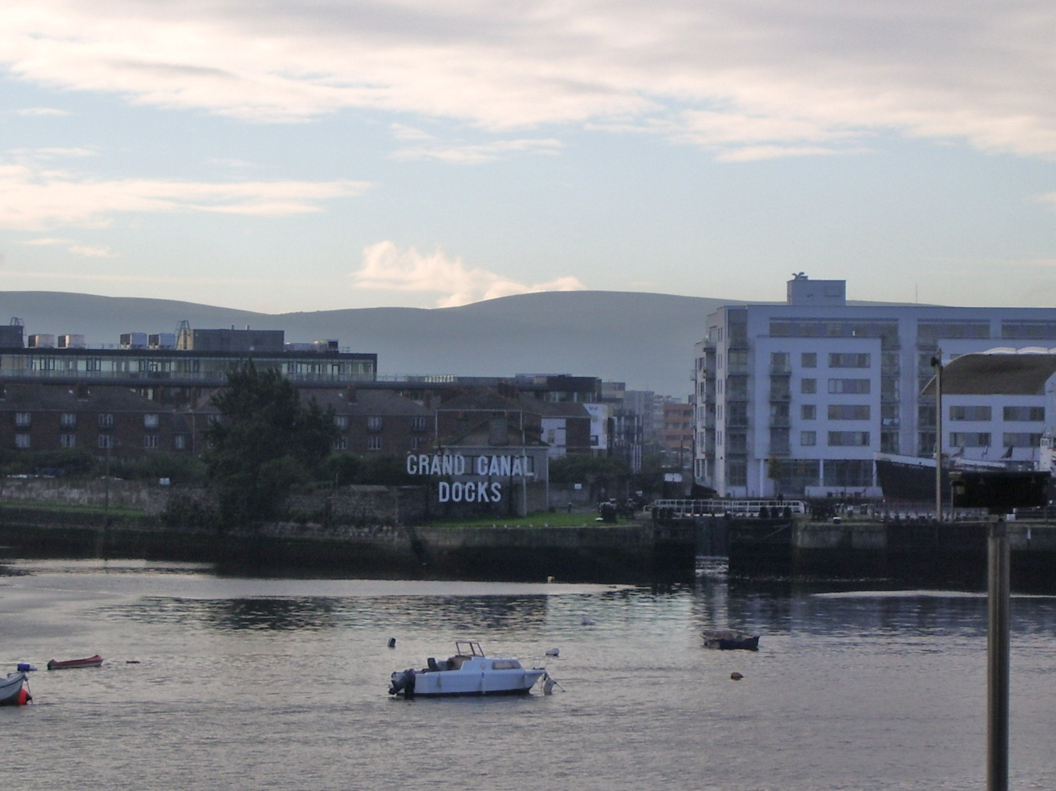 Mündung des Grand Canel in den Fluss Liffey, kurz bevor dieser in die Dublin Bay mündet.